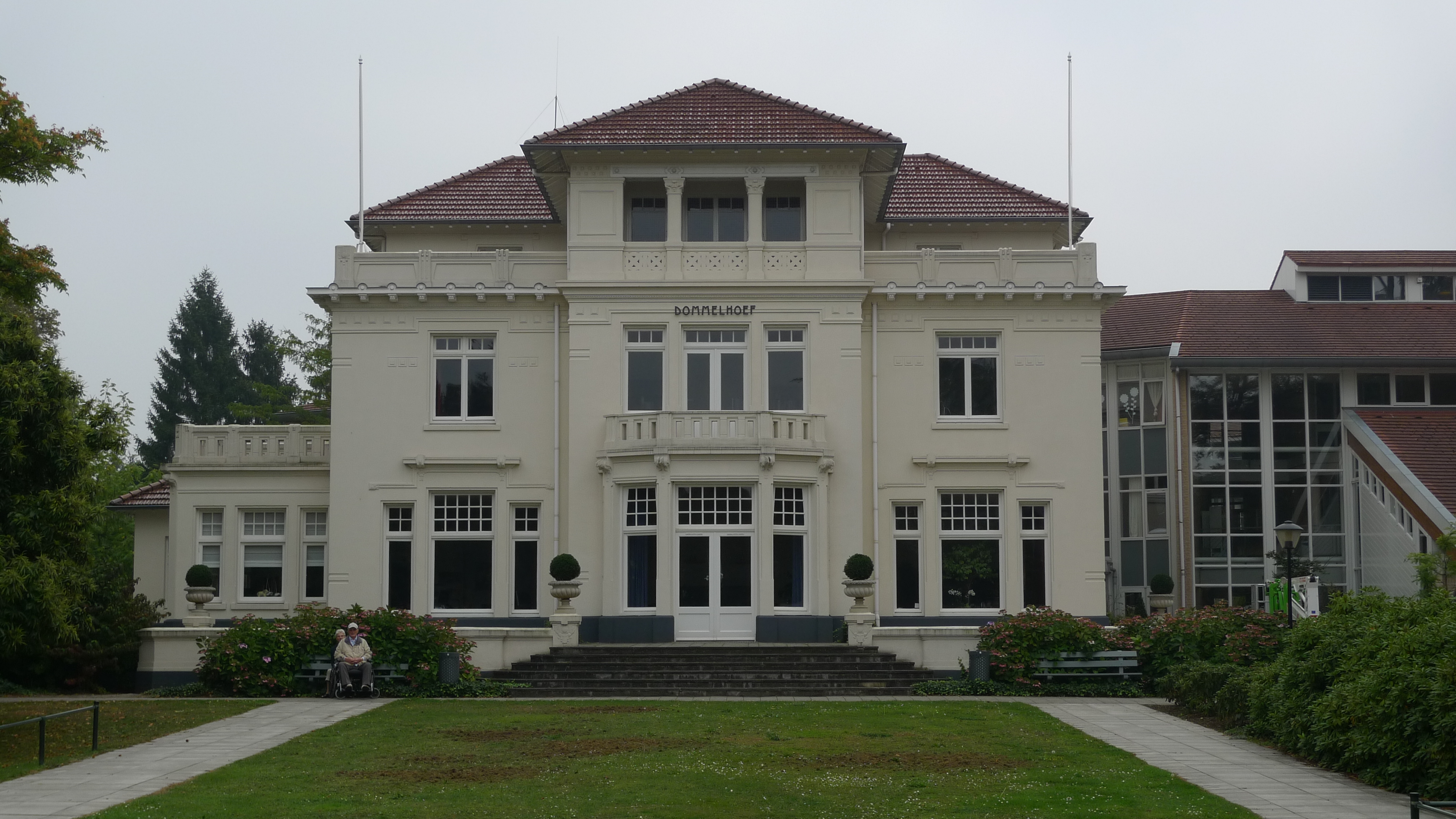 Dommelhoef, Nederlands rijksmonument nr. 518816